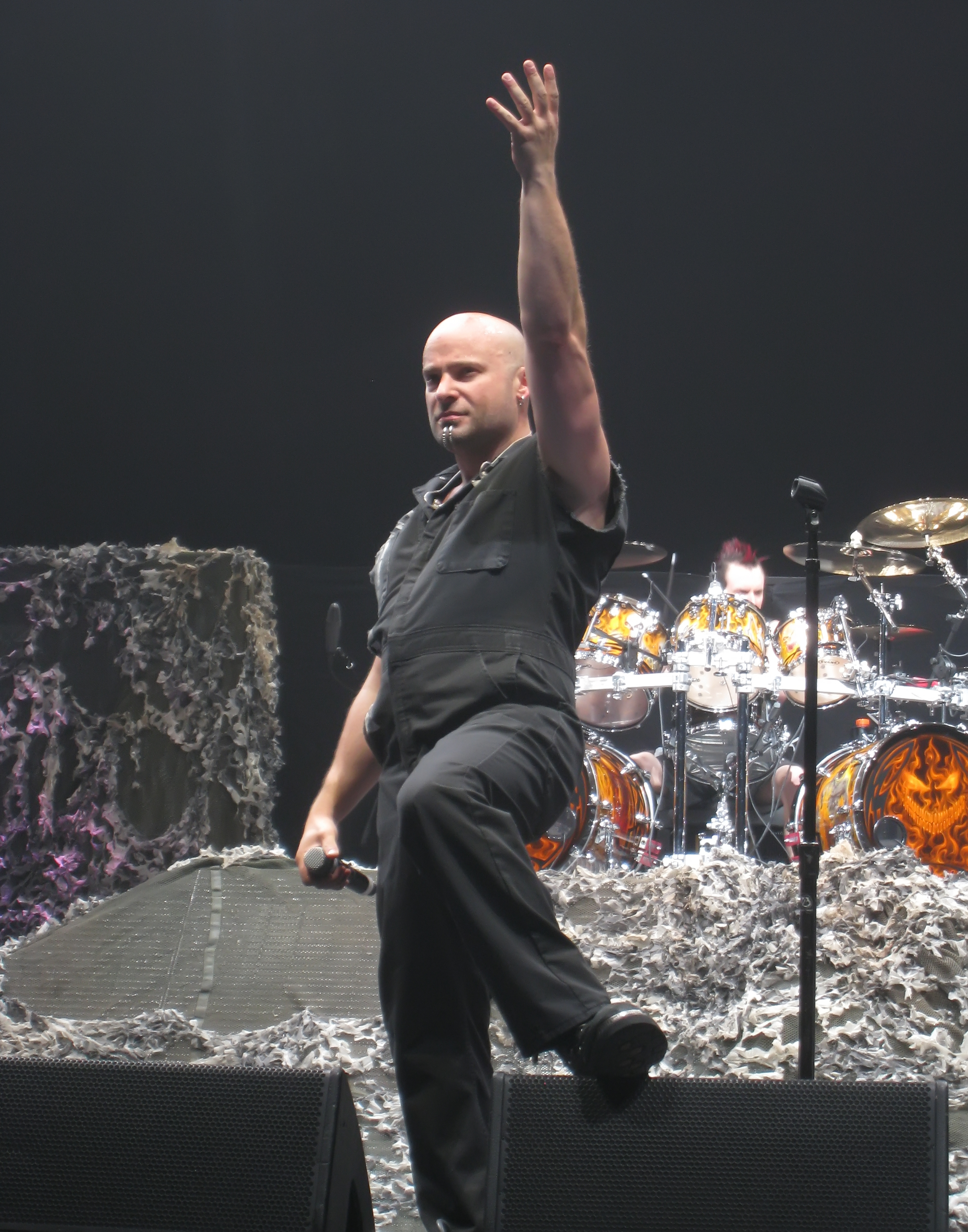 David Draiman